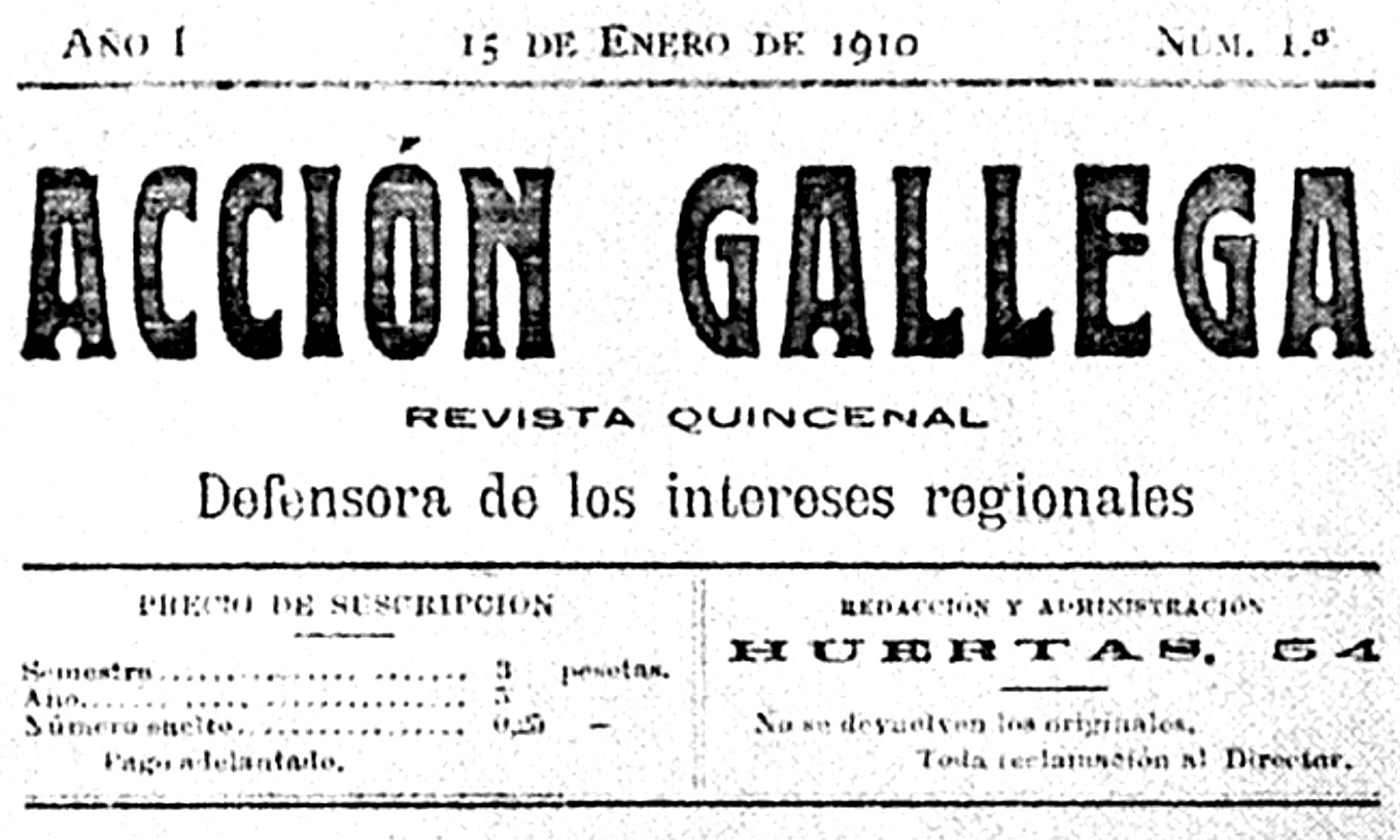 Acción Gallega